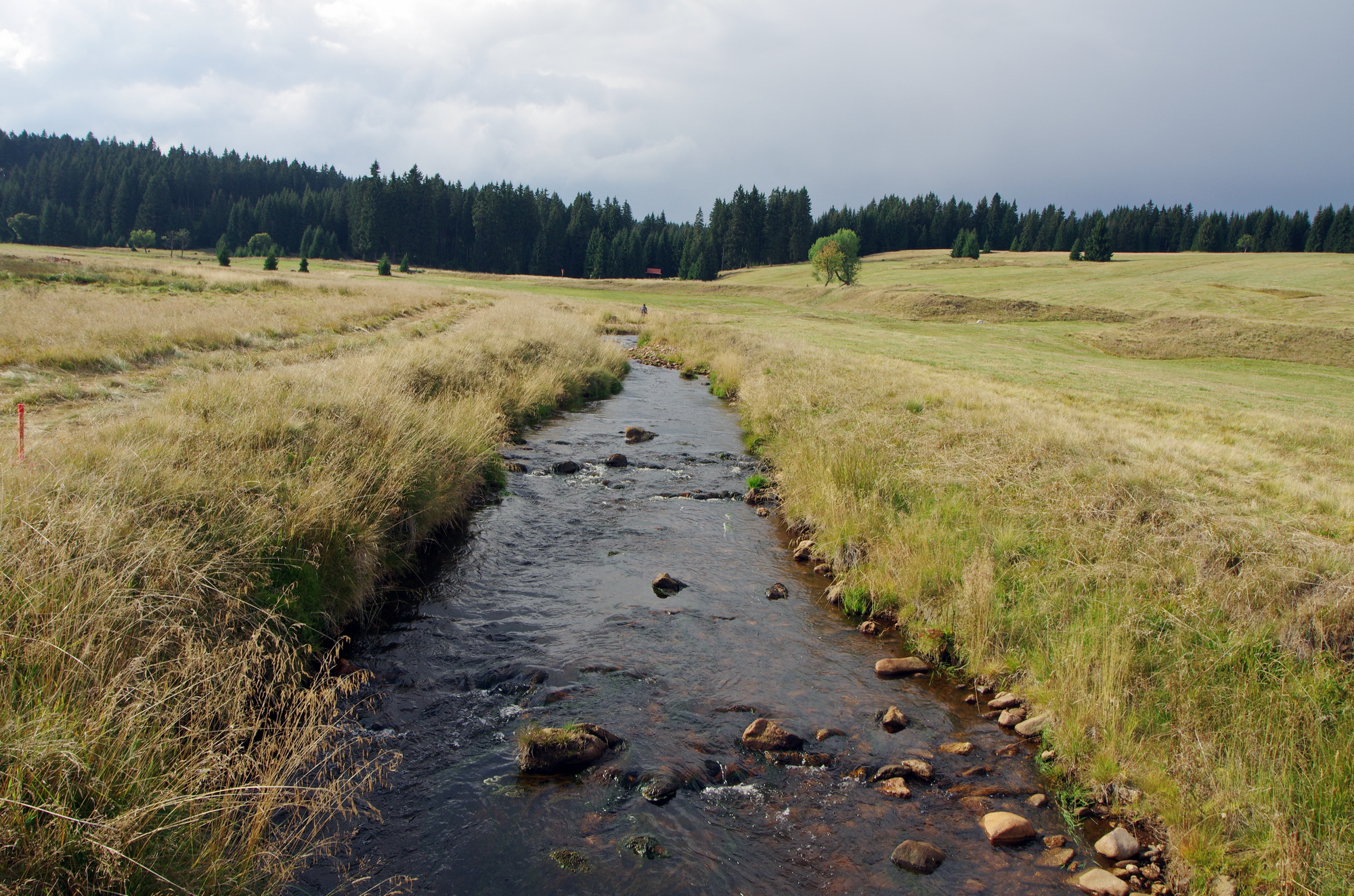 Říčka Rolava v místě zaniklé osady Chaloupky, Krušné hory, okres Sokolov